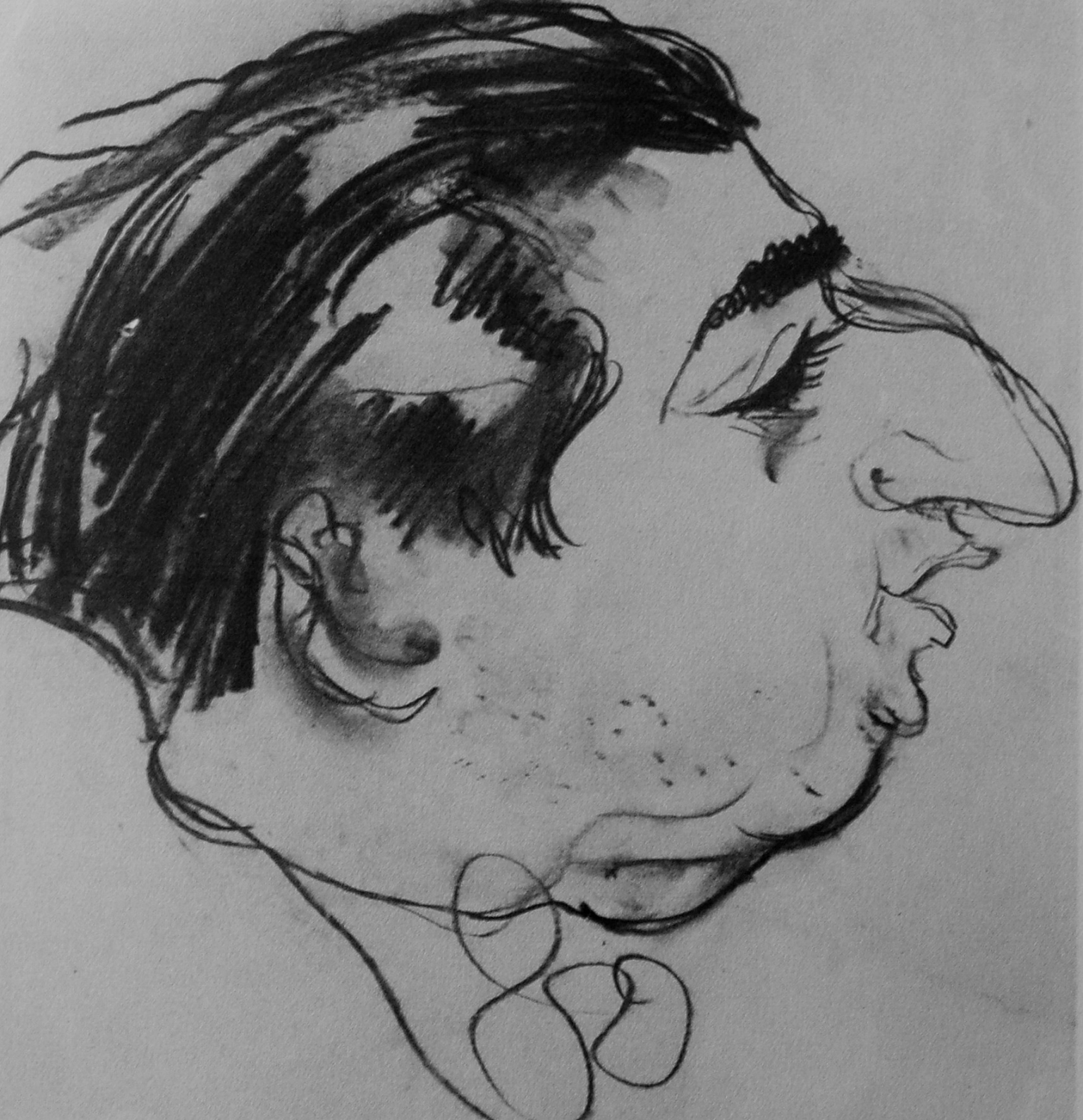 Isaac Grünewald.Karikatyrteckning av konstnärsvänner utförd av konstnären John Jon-And, utgiven postumt efter hans död 1941 i boken Konstnärer Gebers Förlag.